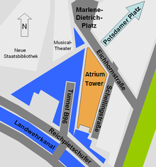 debis-Haus site plan